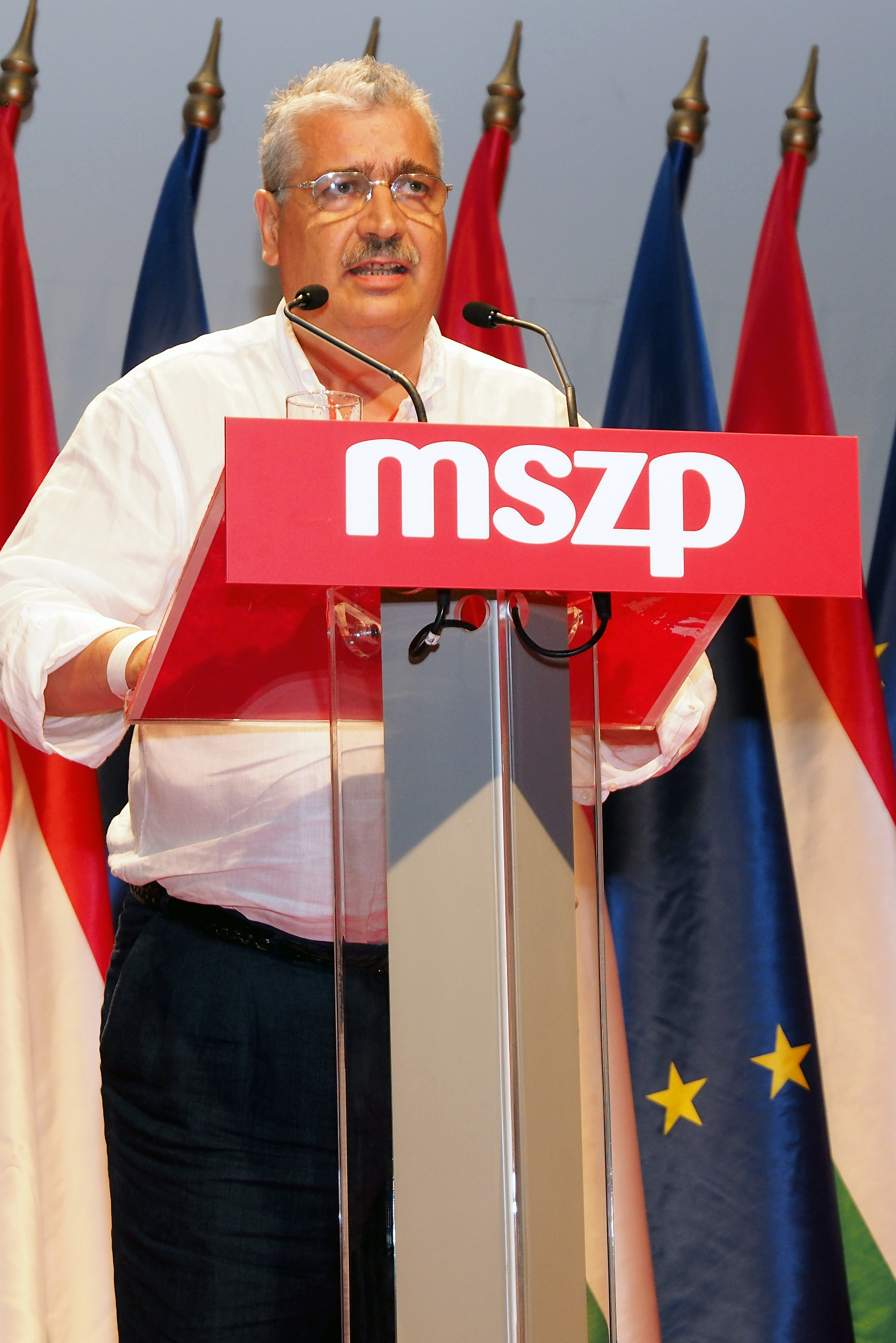 Az MSZP 2014. júliusi kongresszusa. Steiner Pál